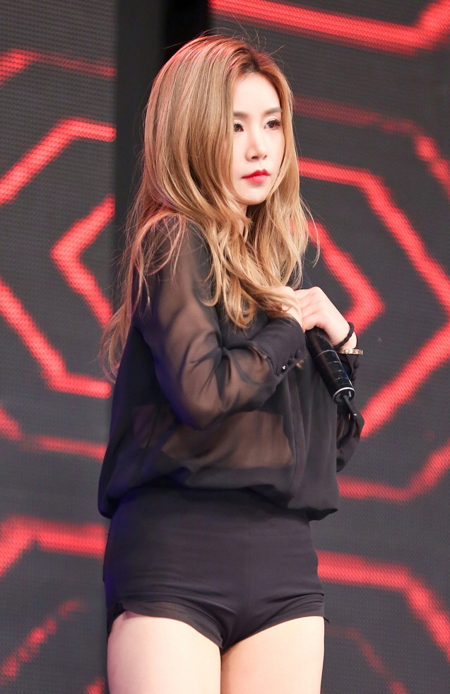 [15.05.27] 원주 위문열차 직찍( 피에스타 재이, 린지, 예지, 혜미, 차오루 )